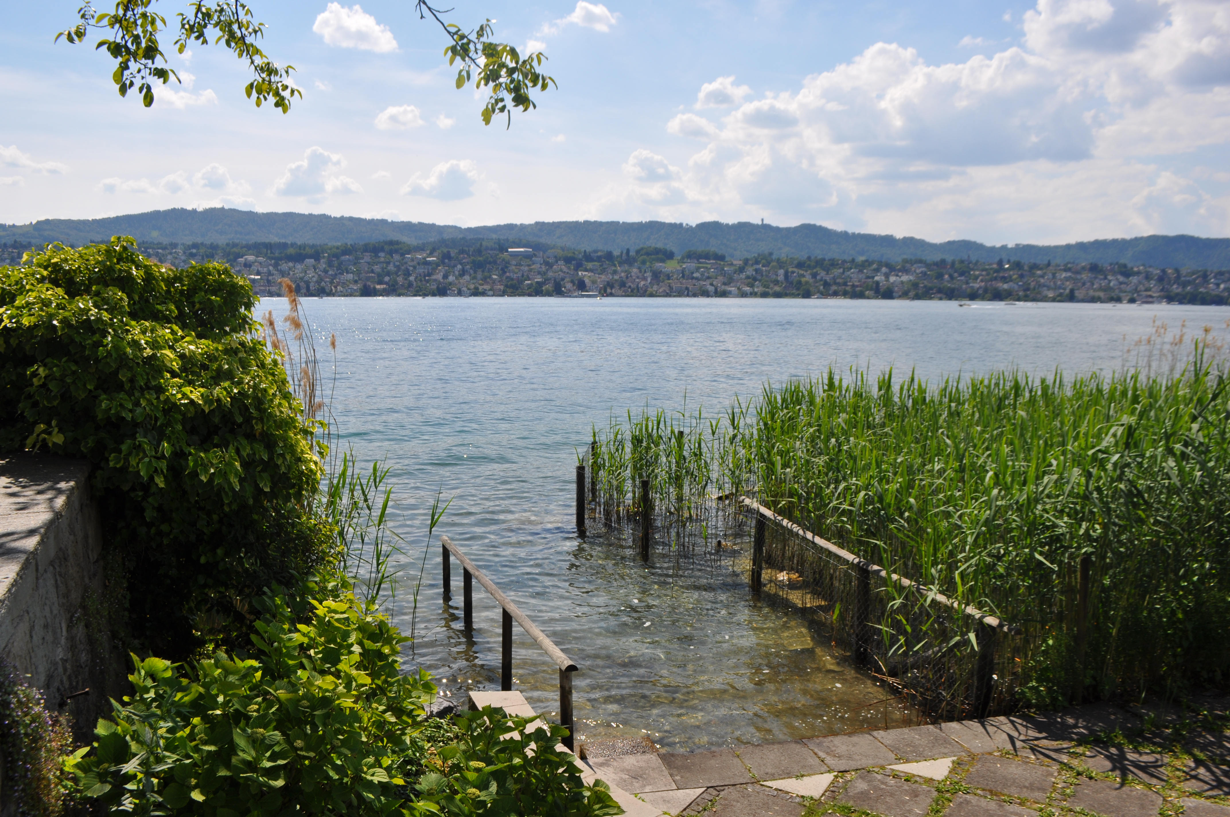 Bootssteg neben dem Wohnhaus von Carl Gustav Jung in Küsnacht, Zürichsee, Suiza.